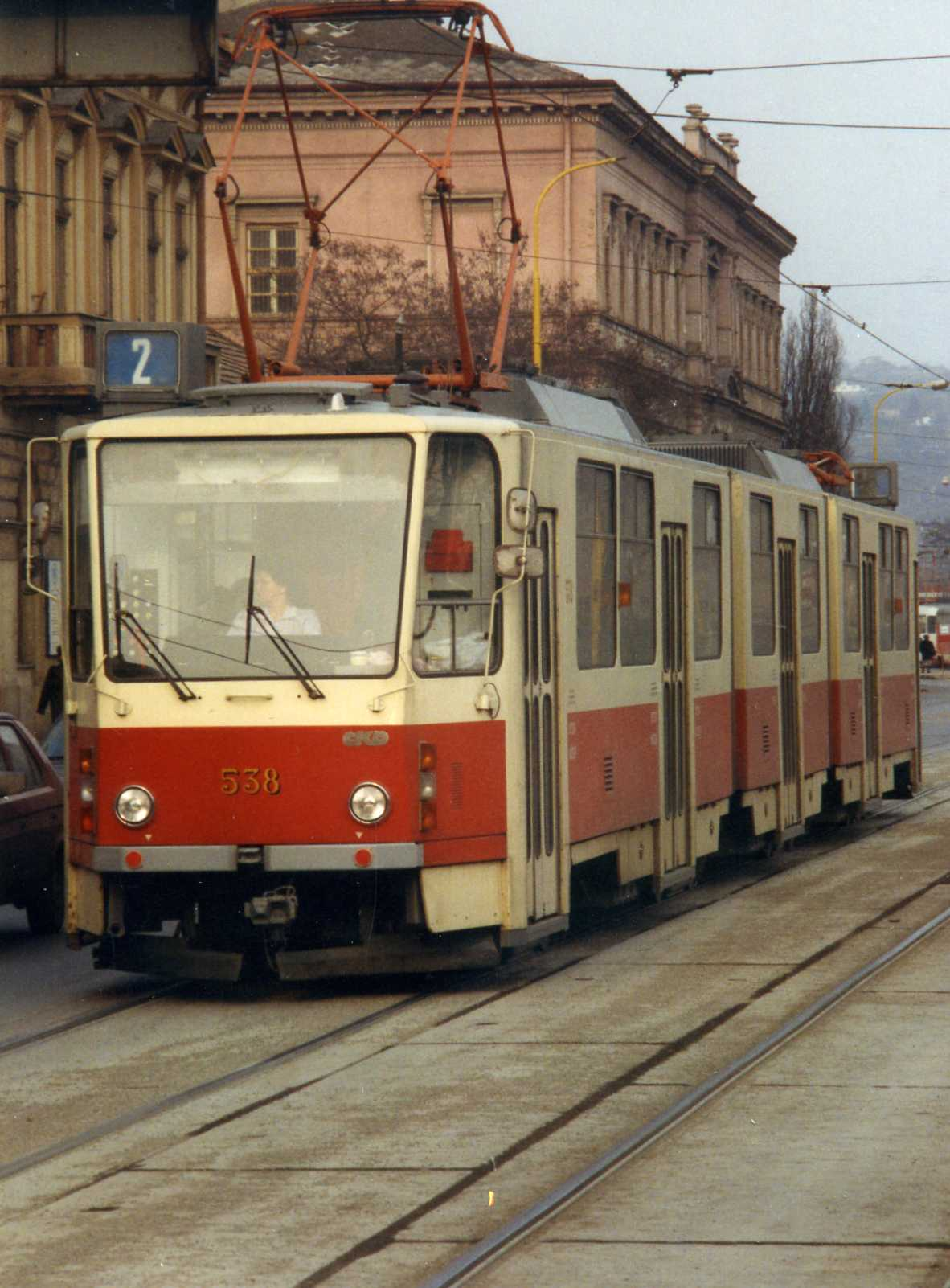 Tatra KT8D5 tram nr 538 in Košice , Slovakia. March 1993